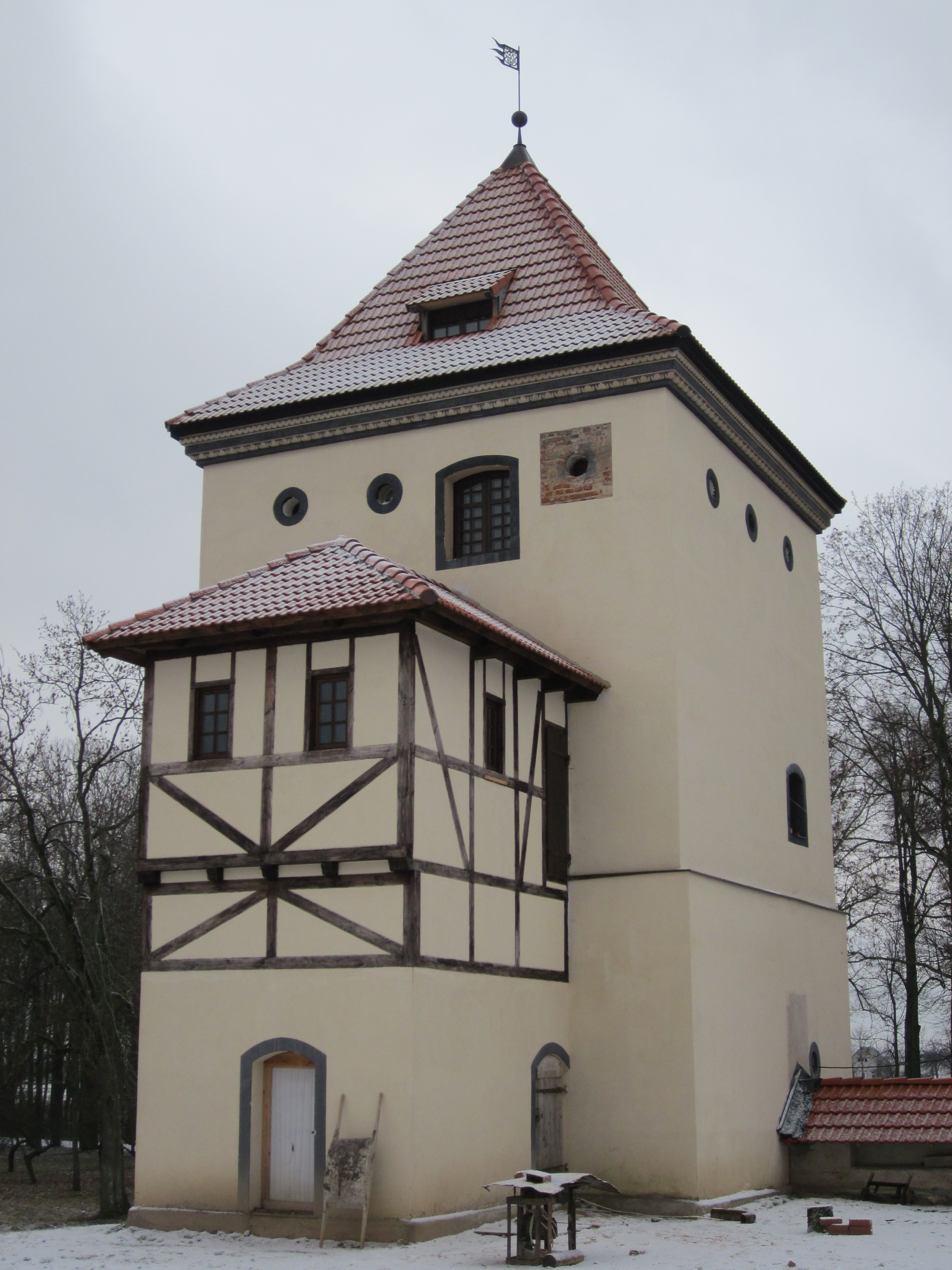 Беларуская (тарашкевіца): Фрагмэнты замка:дзьве вежыземляныя ўмацаваньні з рэшткамі абарончых збудаваньняўбылы палацфлігель. г. п. Любча This is a photo of Belarusian heritage monument. Reference number: 412Г000453 ( WLM)